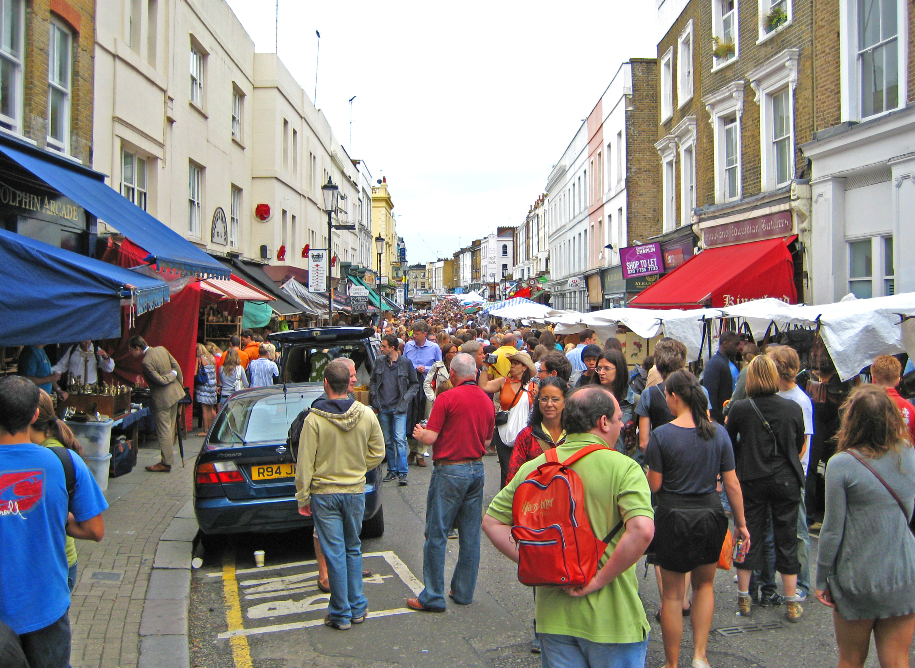 London - Portobello Market